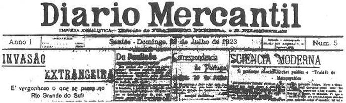 Cabeçalho da primeira página da edição nº 5 do jornal Diário Mercantil, periódico que circulou em 1923 na cidade de Santos, estado de São Paulo, Brasil.